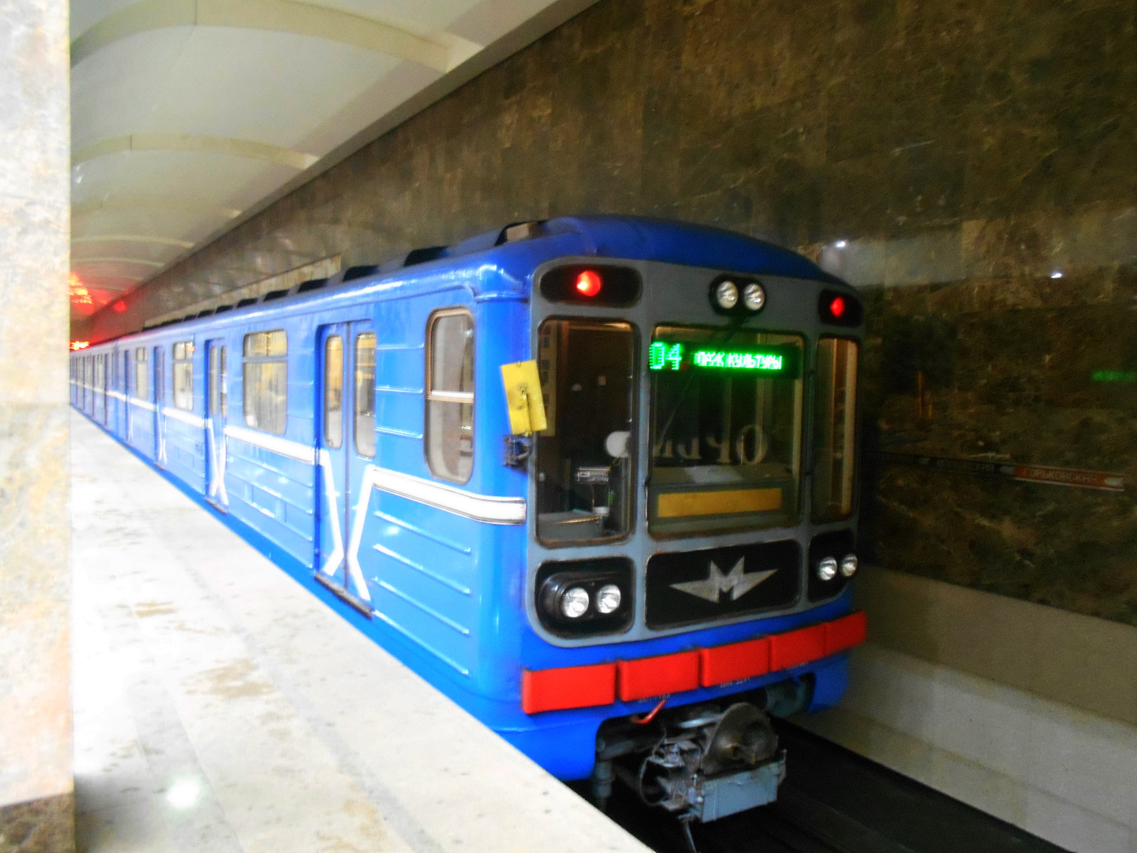 Поезд 81-717.5/714.5 на станции "Горьковская" Нижегородского метрополитена